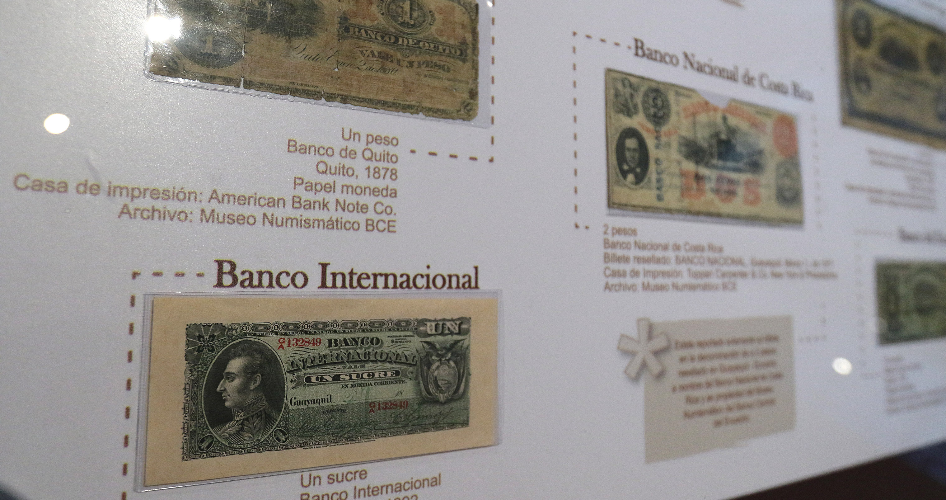 Quito, 7 Ago (Andes).- El museo Numismático del Banco Central del Ecuador acoge una muestra ilustrativa de la monedas que han circulado en el país, Carlos Iza, curador del Museo concedió una entrevista a Andes. Fotografías: Carlos Rodríguez/Andes.